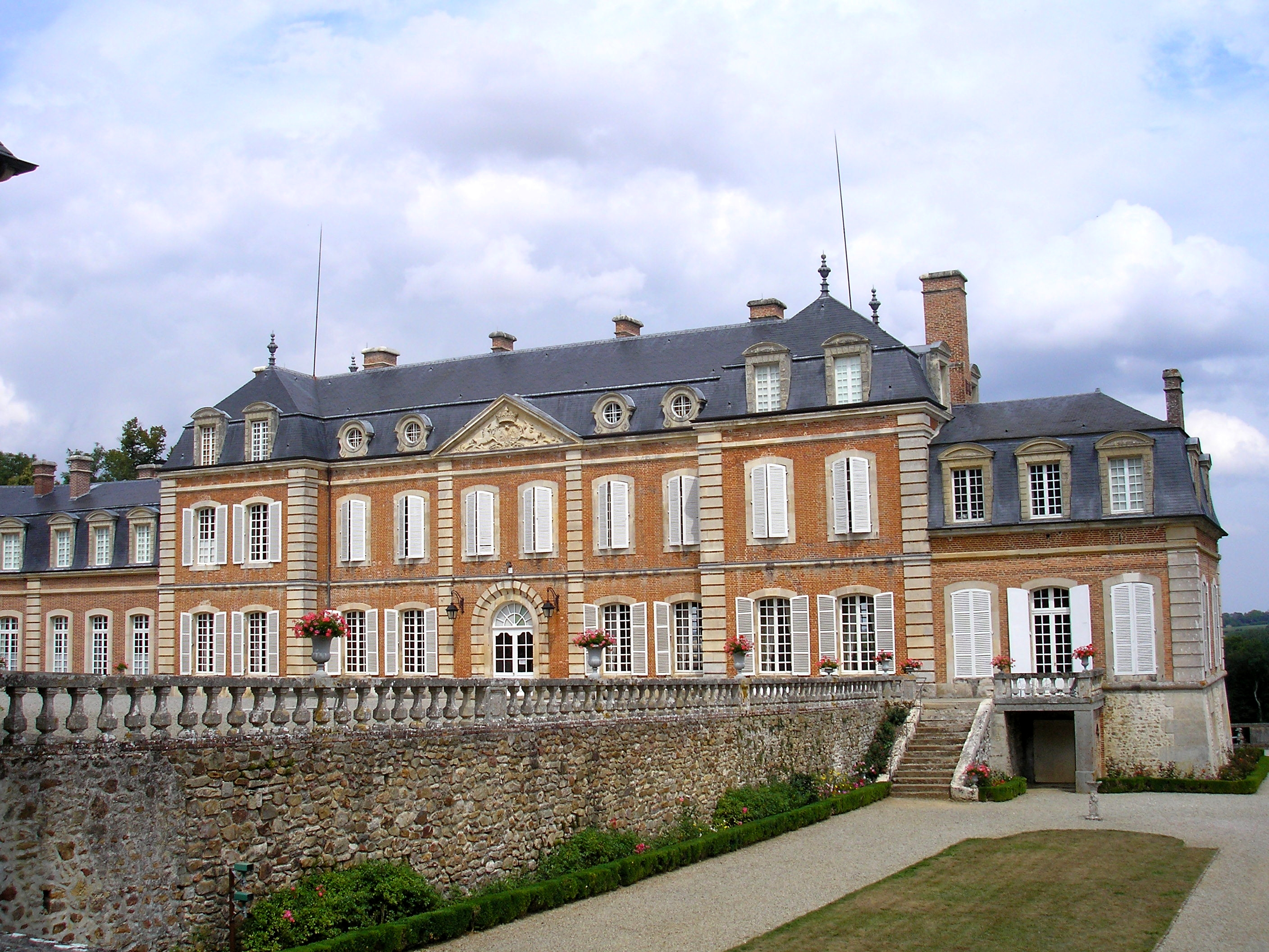 Saint-Christophe-le-Jajolet (Normandie, France). Façade sud-ouest du château de Sassy.